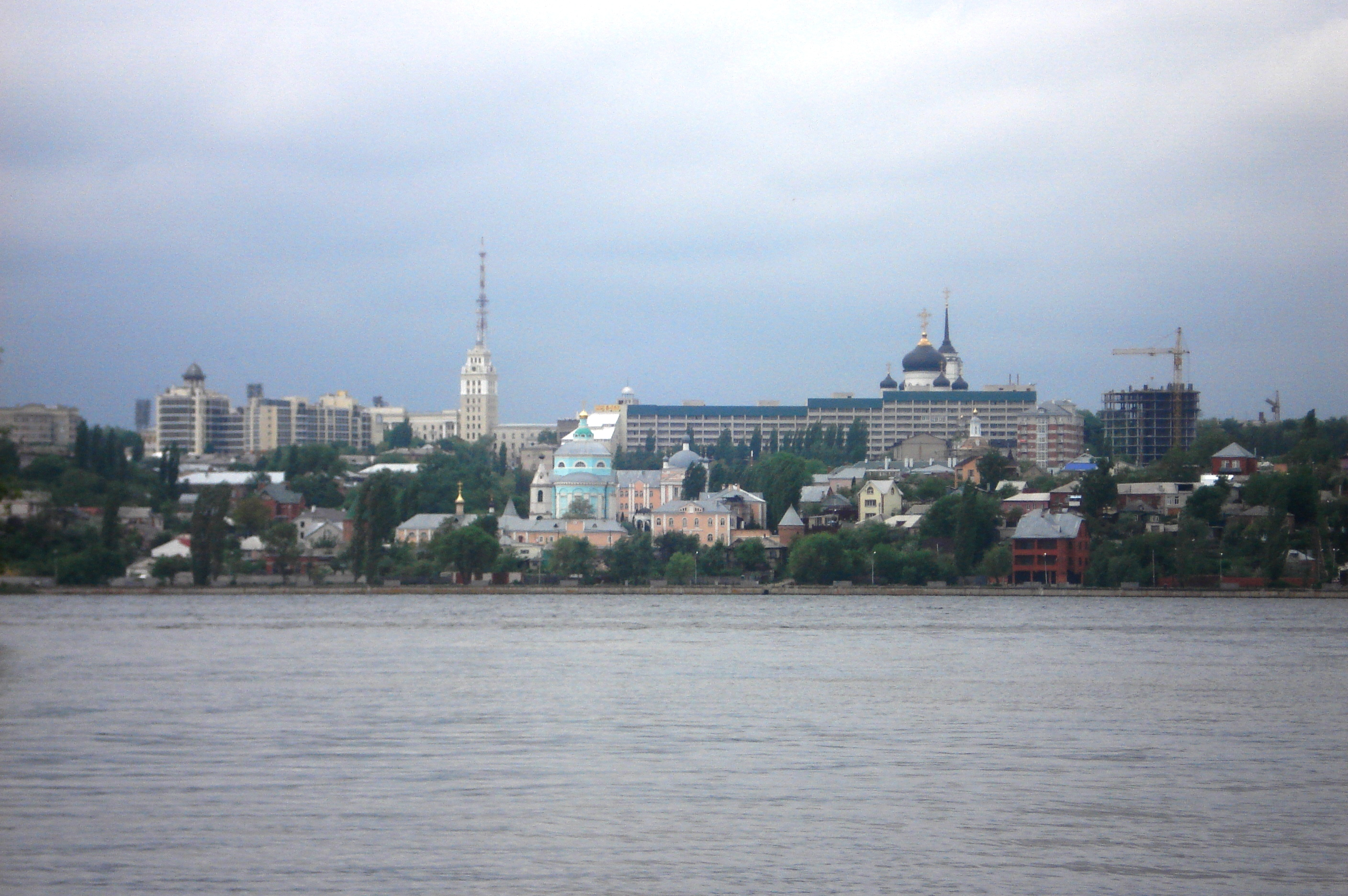 Панорама правого берега Воронежа. Вид из Воронежского водохранилища, ~10 метров от берега